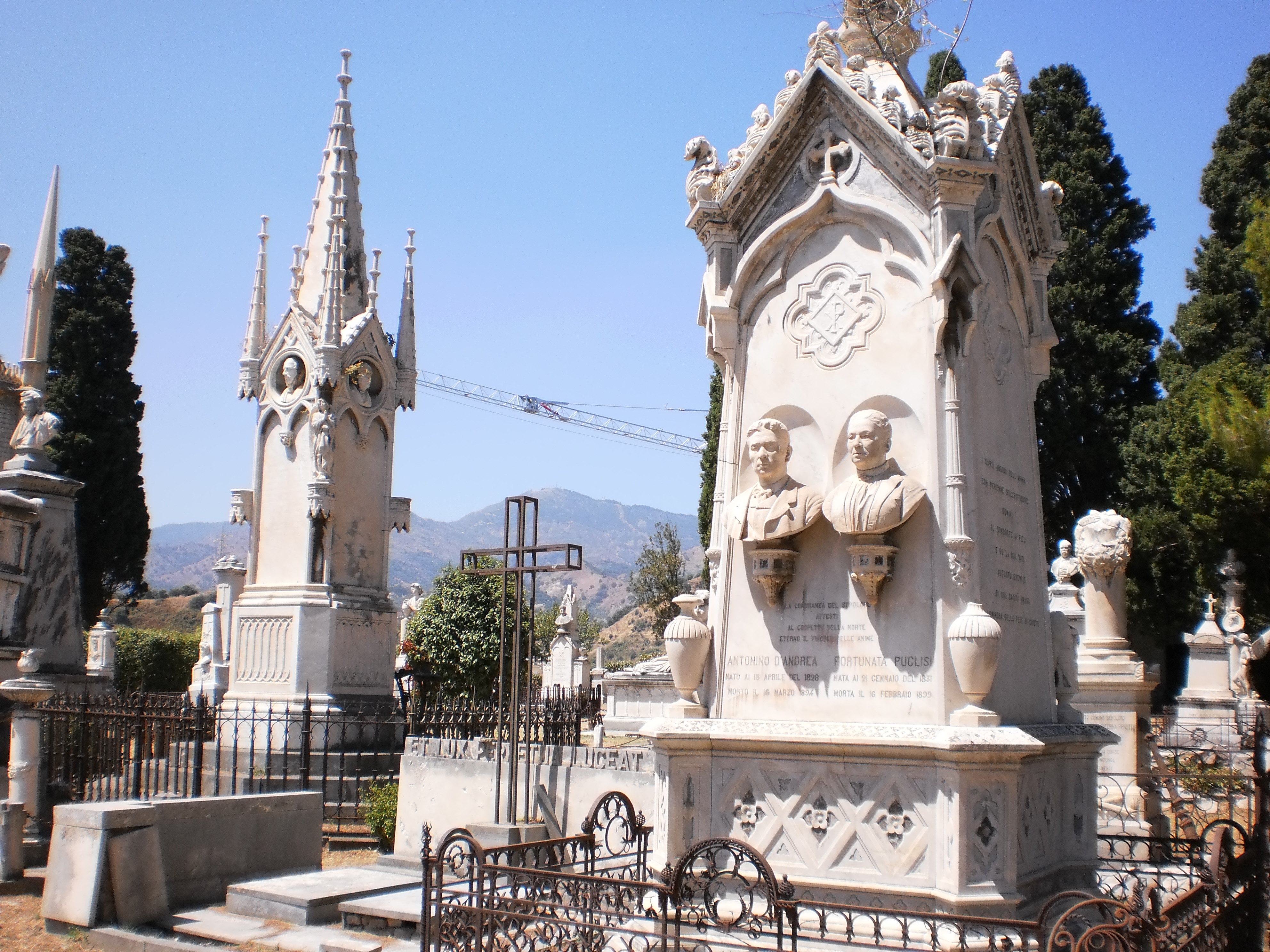 Imponente monumento funerario